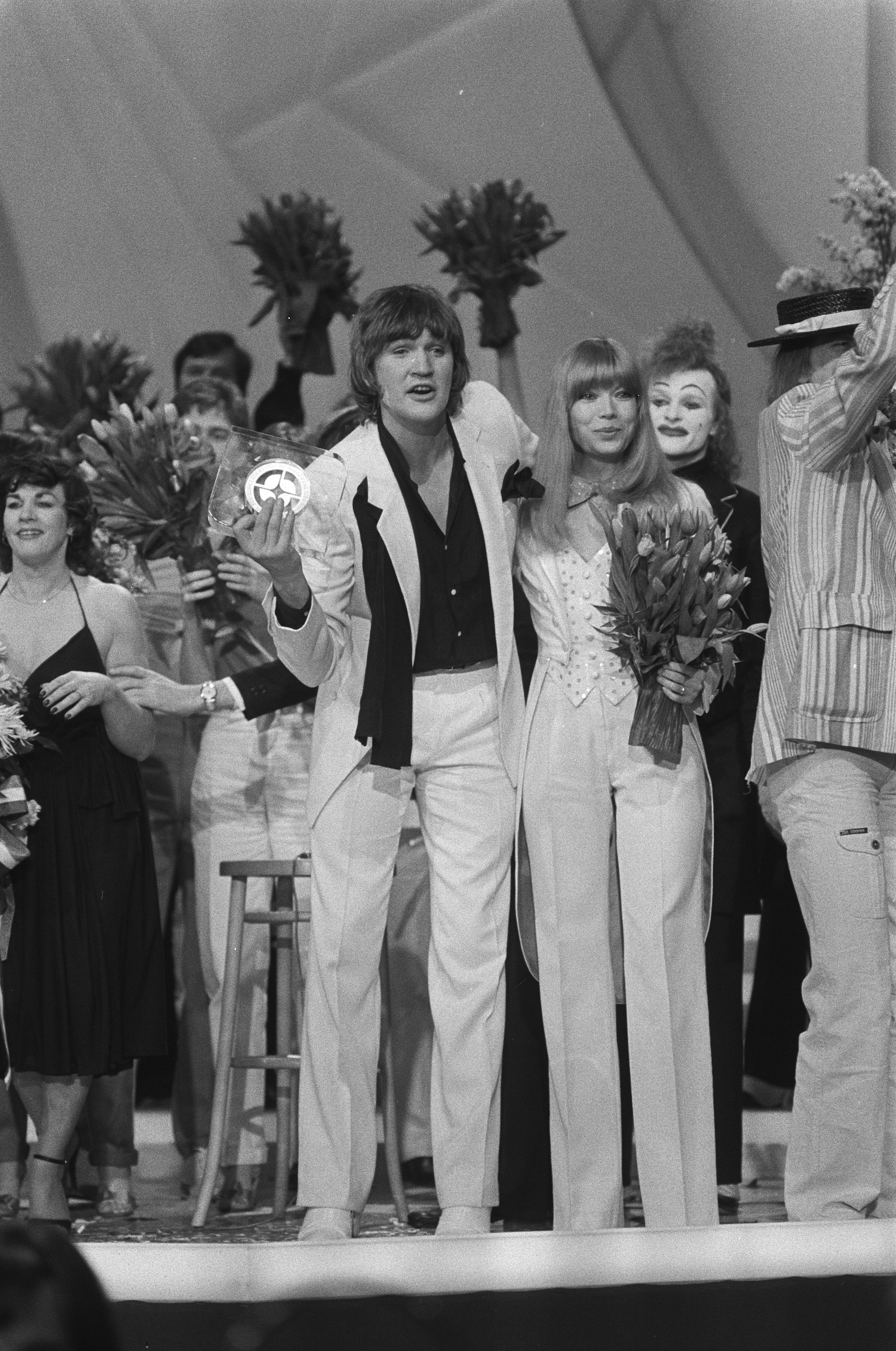 Collectie / Archief : Fotocollectie Anefo Reportage / Serie : [ onbekend ] Beschrijving : Eurovisie Songfestival 1980 ( Den Haag ); winnaar Johnny Logan in de bloemen Datum : 19 april 1980 Locatie : Den Haag, Zuid-Holland Trefwoorden : BLOEMEN, Winnaars, songfestivals Persoonsnaam : Johnny Logan Fotograaf : Dijk, Hans van / Anefo Auteursrechthebbende : Nationaal Archief Materiaalsoort : Negatief (zwart/wit) Nummer archiefinventaris : bekijk toegang 2.24.01.05 Bestanddeelnummer : 930-7804